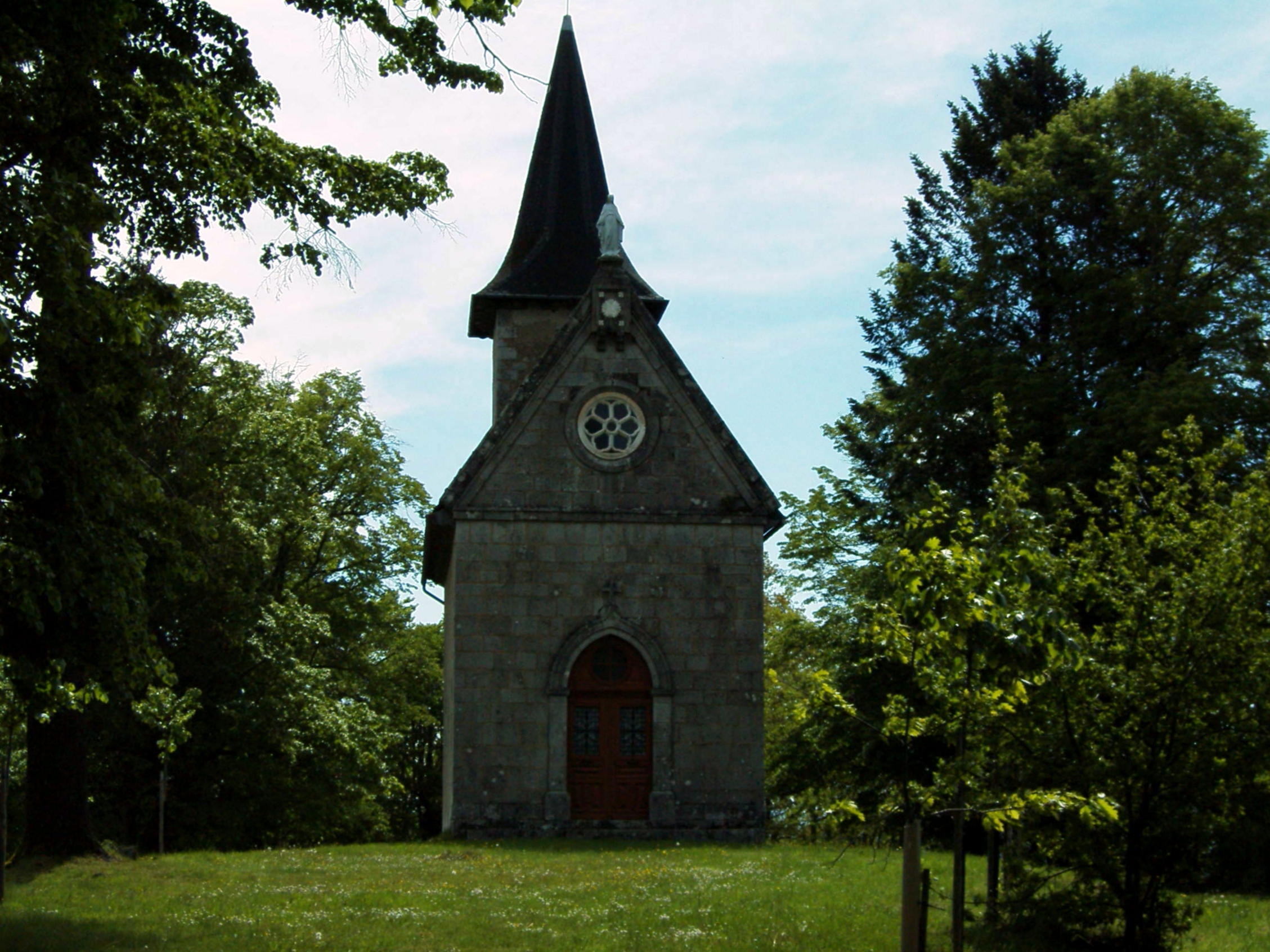 La Chapelle du puy Rachat se trouvant sur la commune de Nieudan dans le Cantal en Auvergne-France.